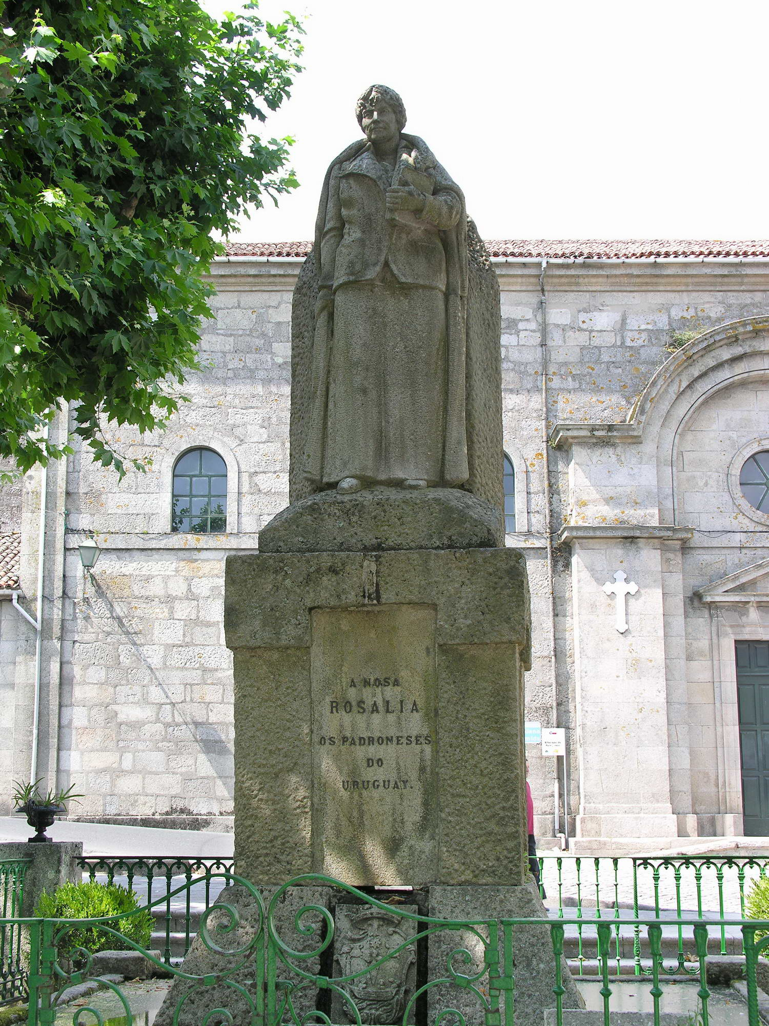 Estatua de Rosalía de Castro Padrón, Galicia Publish by= Luis Miguel Bugallo Sánchez.